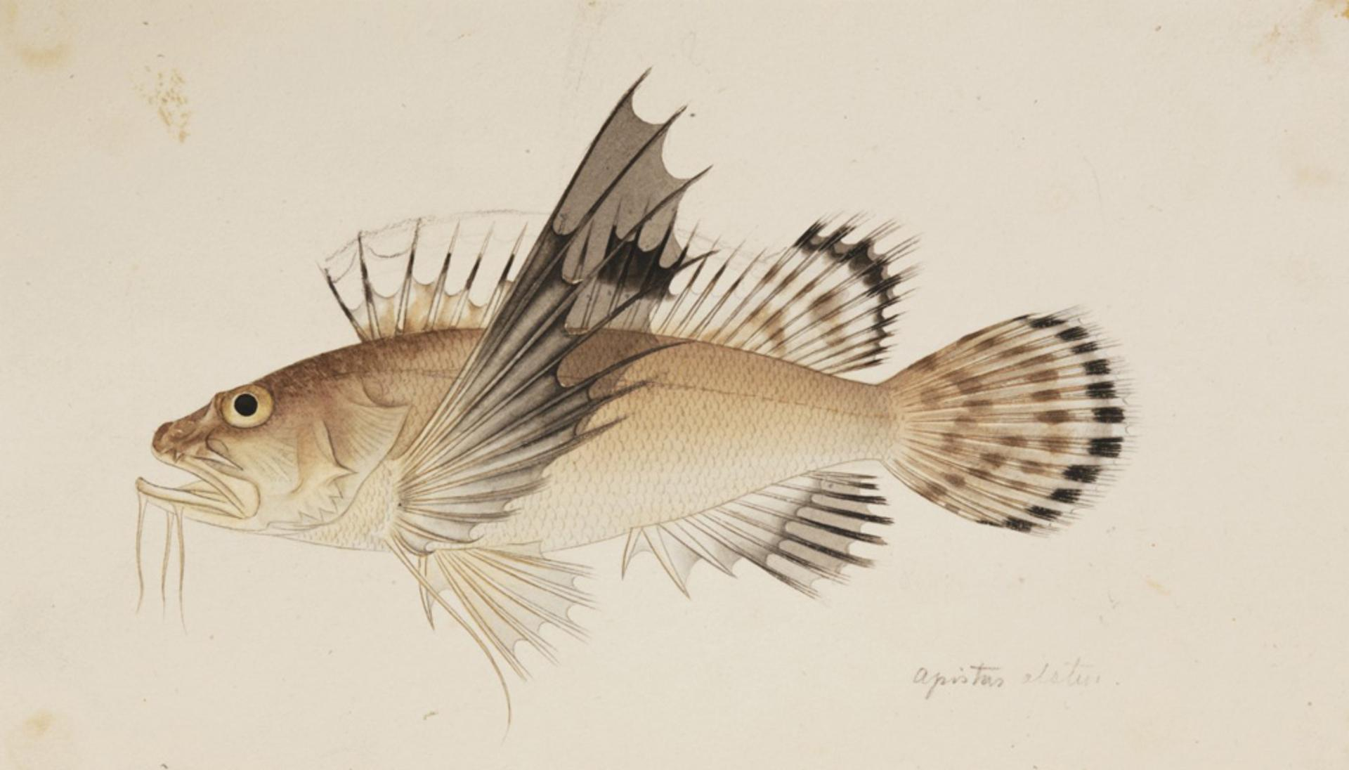 Apistus carinatus (Bloch and Schneider)